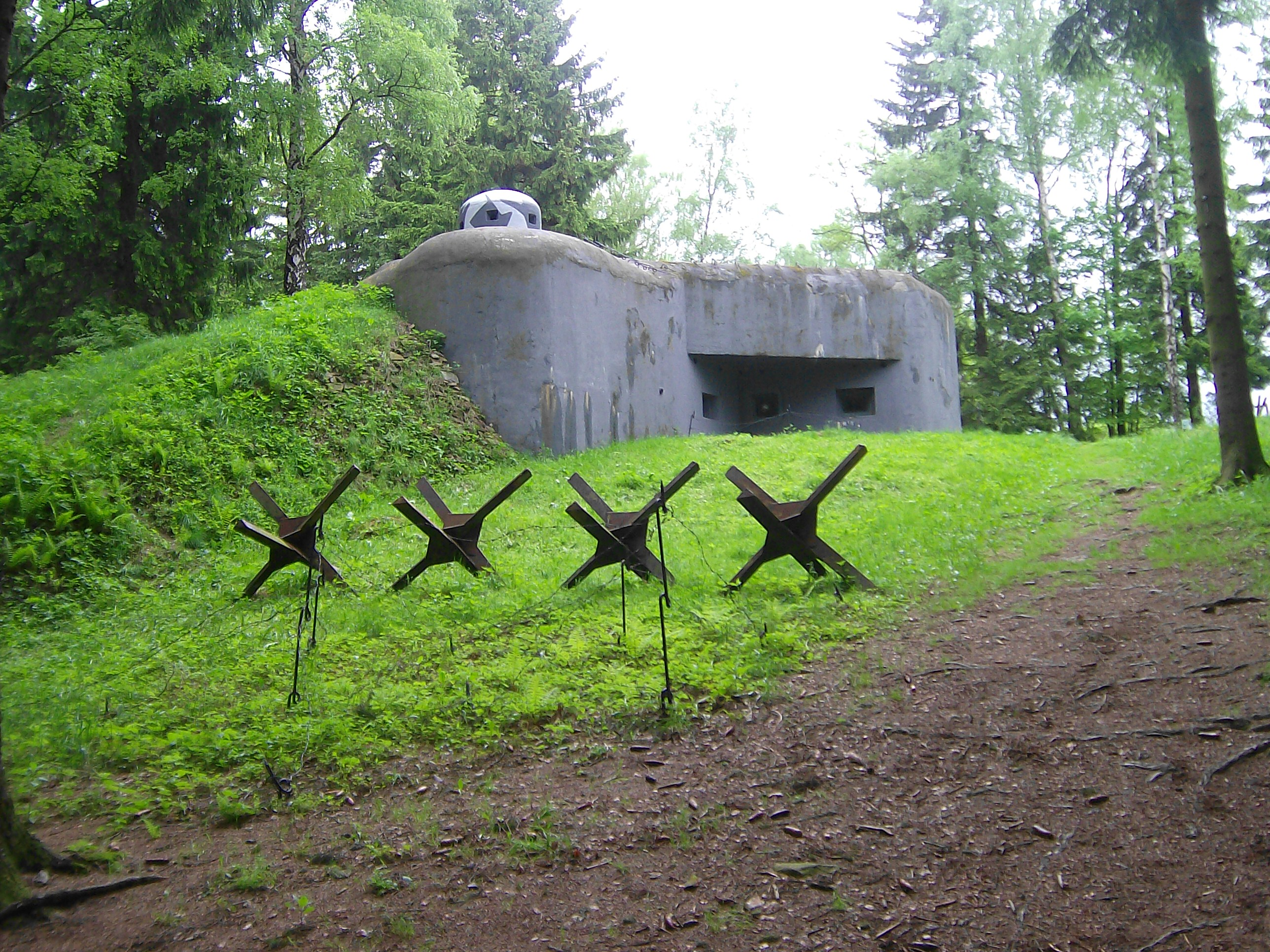 Schron (bunkier) KS-5